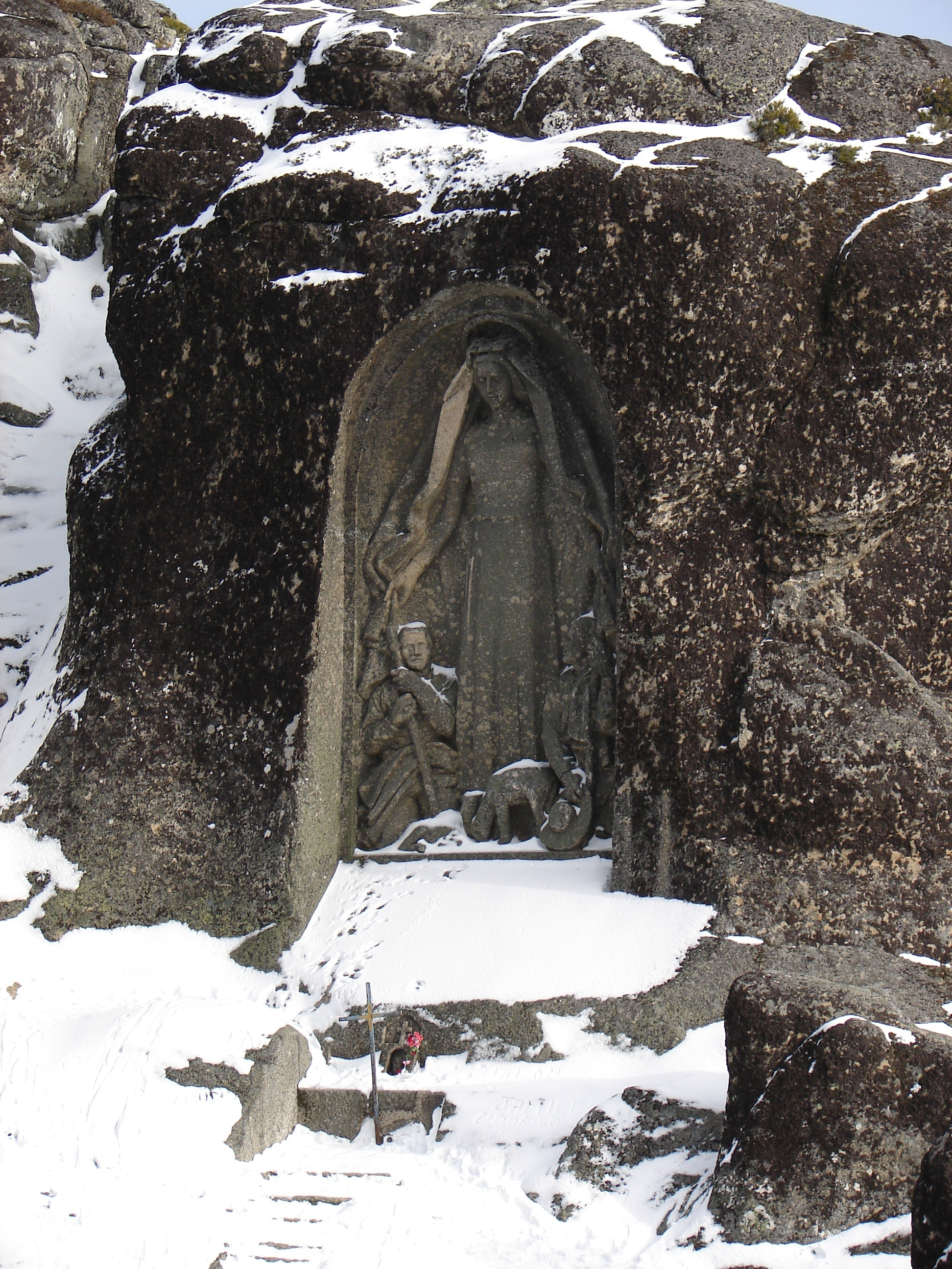 Fotografia tirada na Serra da Estrela. Escultura-monumento de Nossa Senhora da Boa Estrela esculpida na rocha granítica. This is a photography of a Site of Community Importance in Portugal with the ID: PTCON0014. Natura2000 entry, EEA entry This file was uploaded for Wiki Loves Monuments in Portugal with the unique identifier 71598.